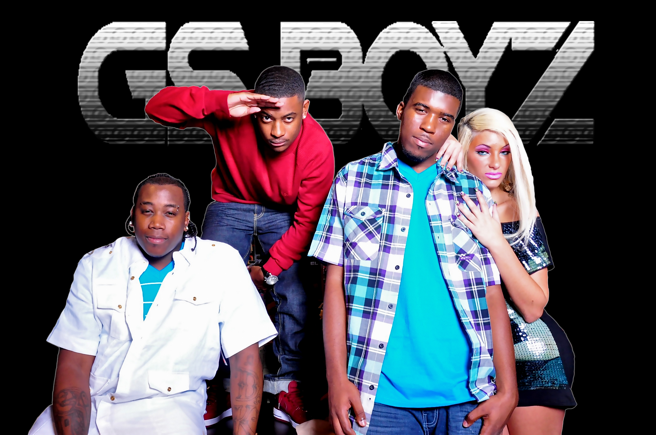 GS BOYZ